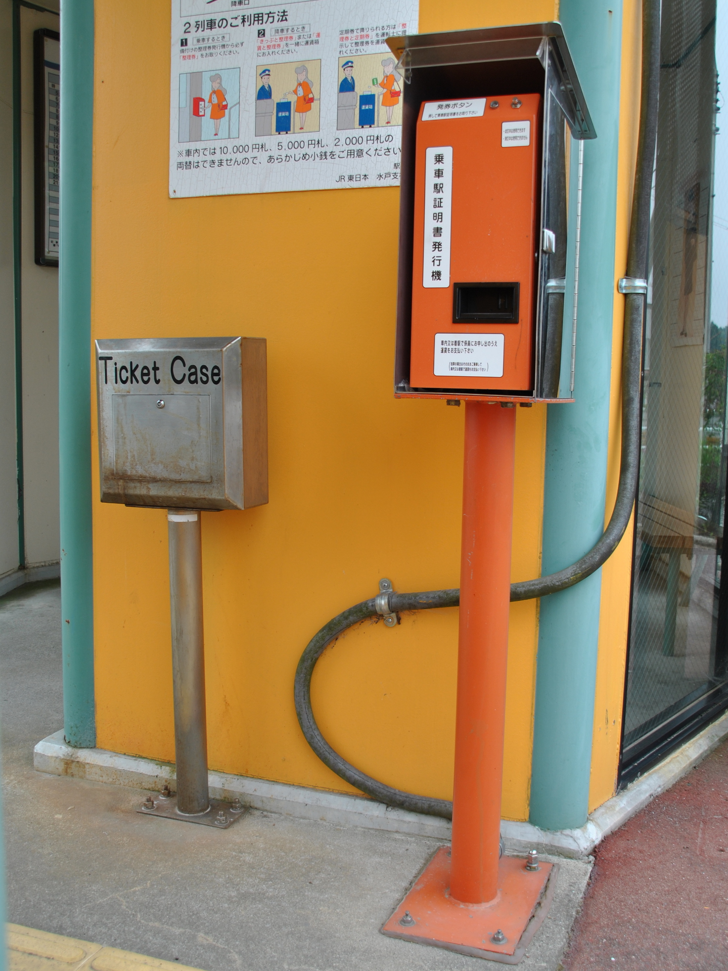 磐城太田駅の乗車券回収箱と乗車駅証明書発行機